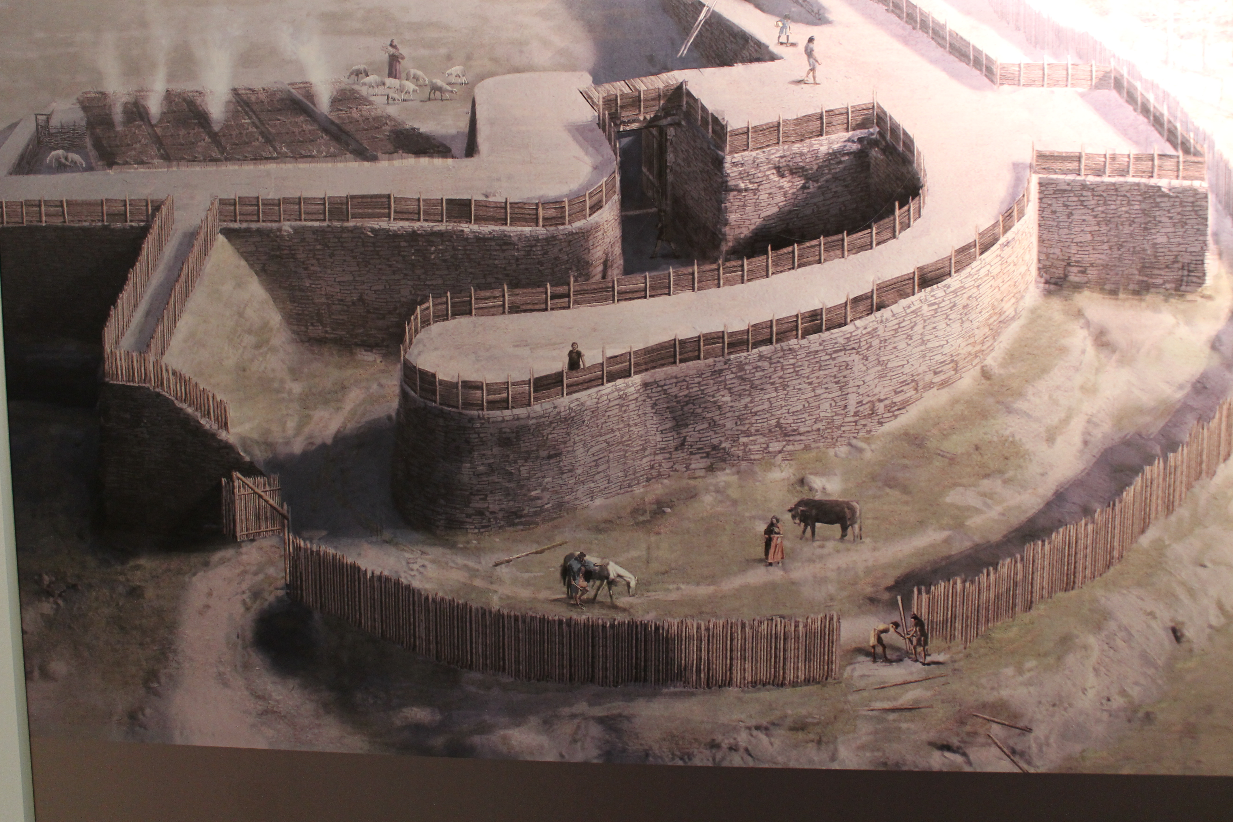 Arrolako Burdin Aroko herri harresituaren marrazkia. Hor ikus daiteke nola izango zen herria edo Oppiduma. Bilboko Arkeologi Museoan egindako erakusketako panela da.